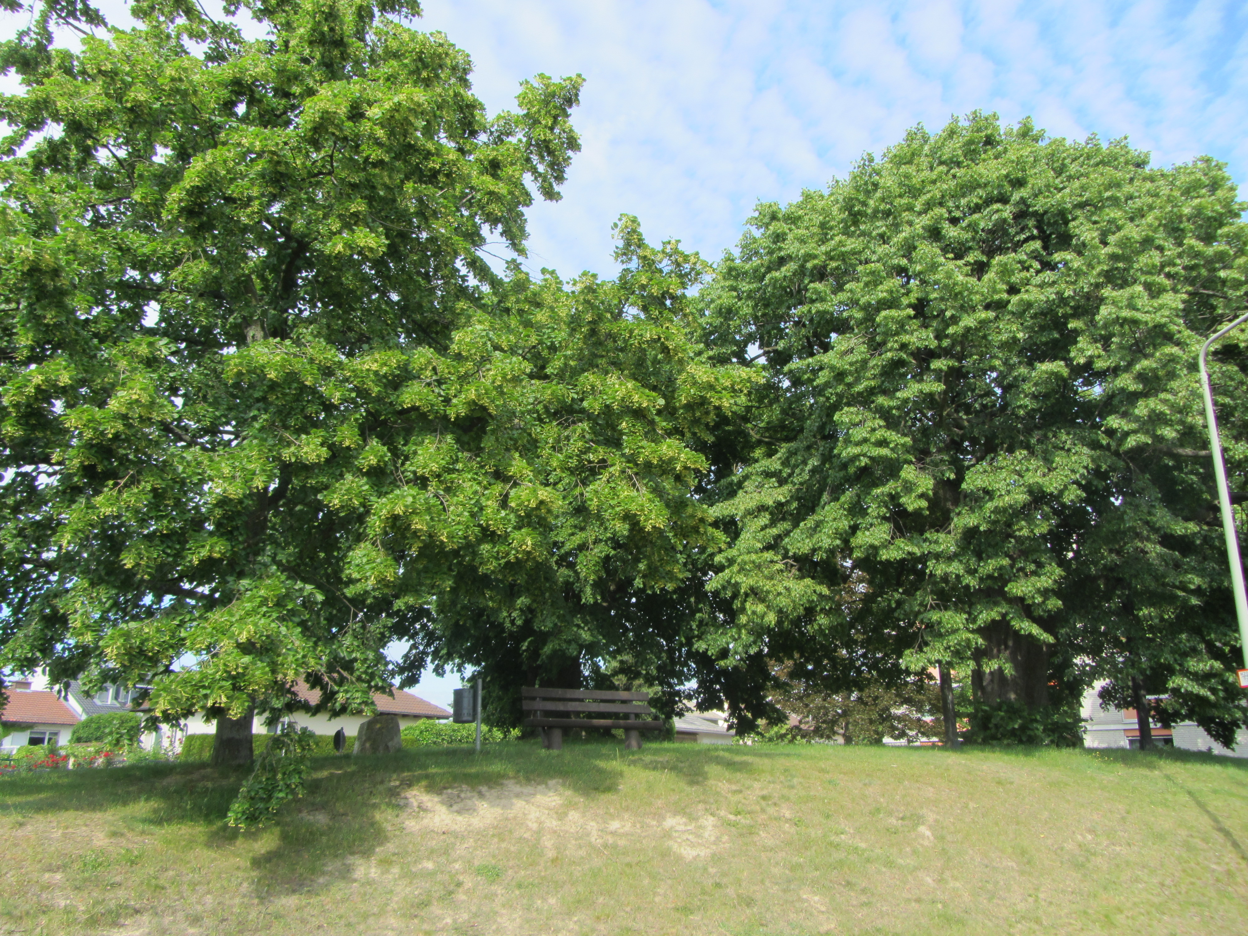 Die Drei Linden in Bad Soden am Taunus